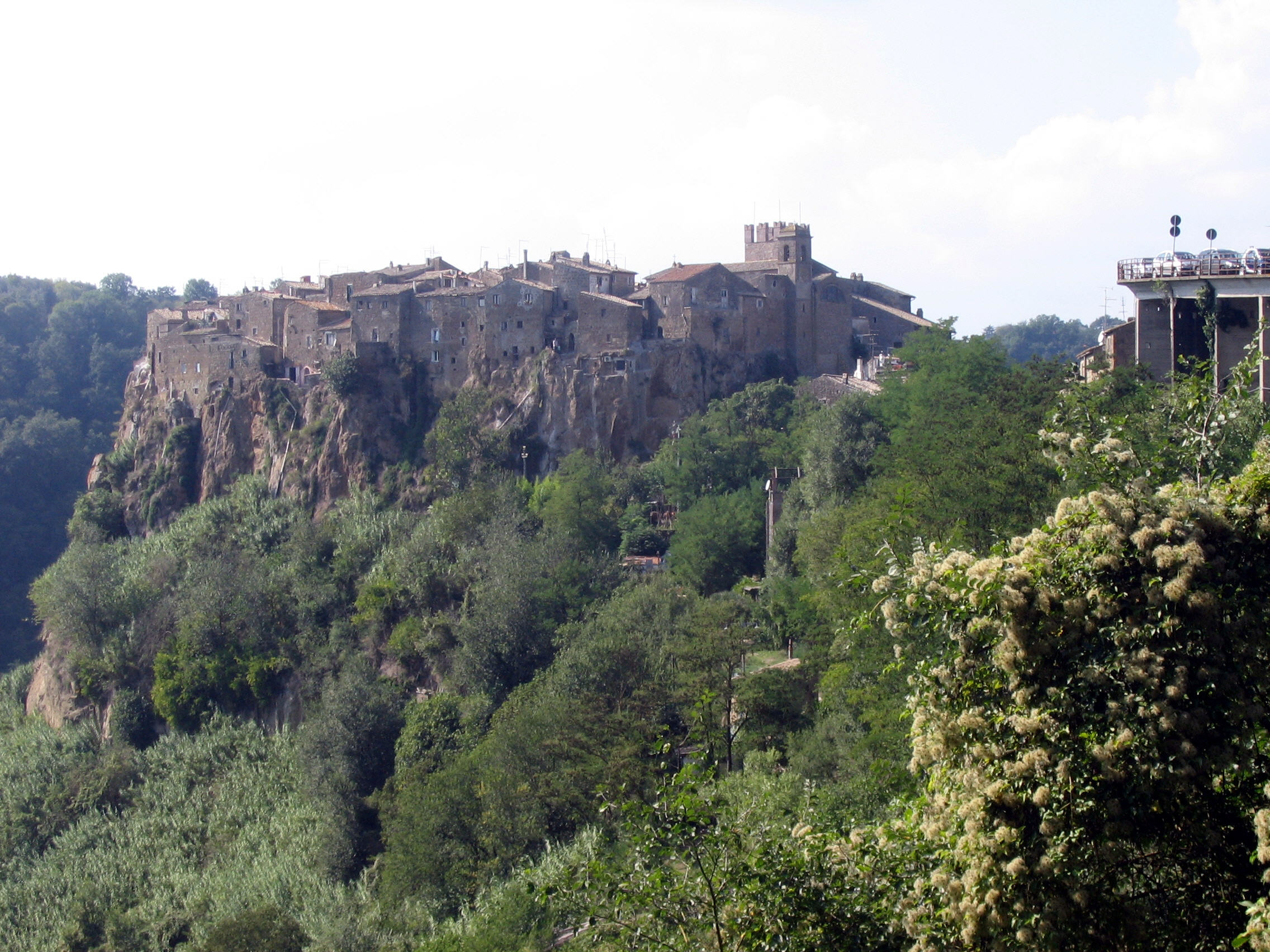 Calcata, Lazio, Italia